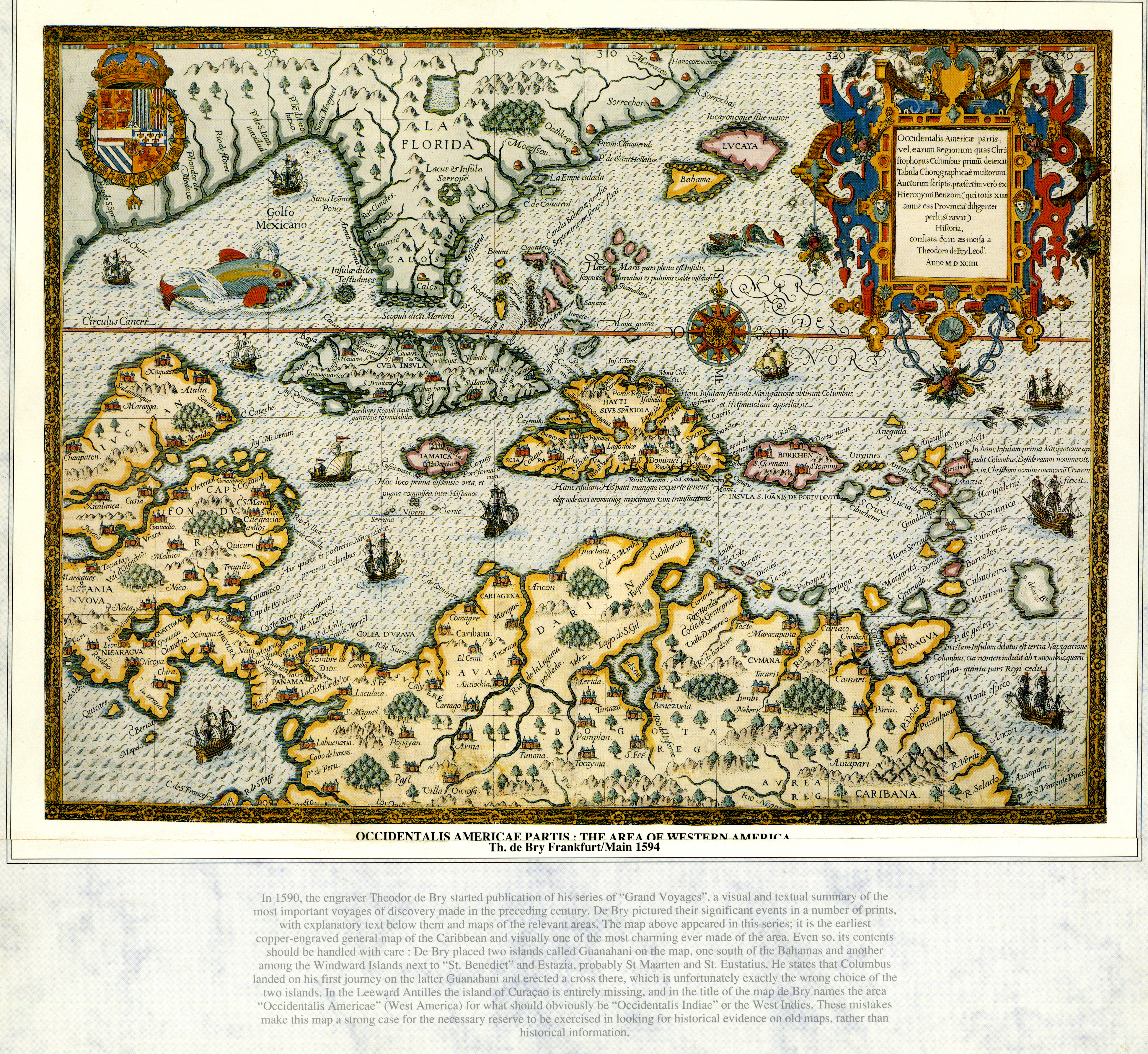 Diapositiva de Consulta y acceso público cuya información fue investigada de un libro y/o ejemplar de revisión custodiado en los Fondos Bibliográficos y Cartográfico (Sección Siglo XVI o Etapa Colonial) del Archivo Histórico del Guayas; Guayaquil, Ecuador.